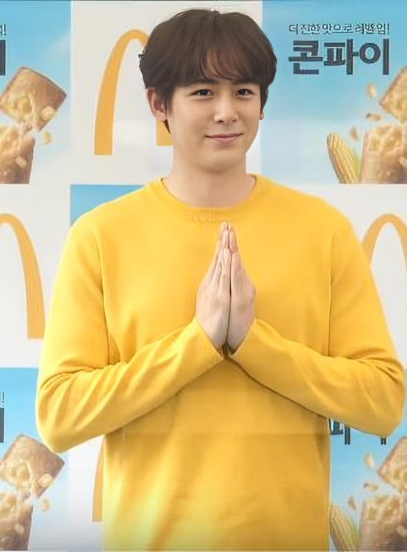 10일 오전 서울시 마포구 상암동 맥도날드 상암 DMC점에서 '맥도날드에서 즐기는 태국의 맛, 콘파이' 행사가 열려 2PM 닉쿤이 참석해 팬사인회와 포토타임을 갖고 있다.